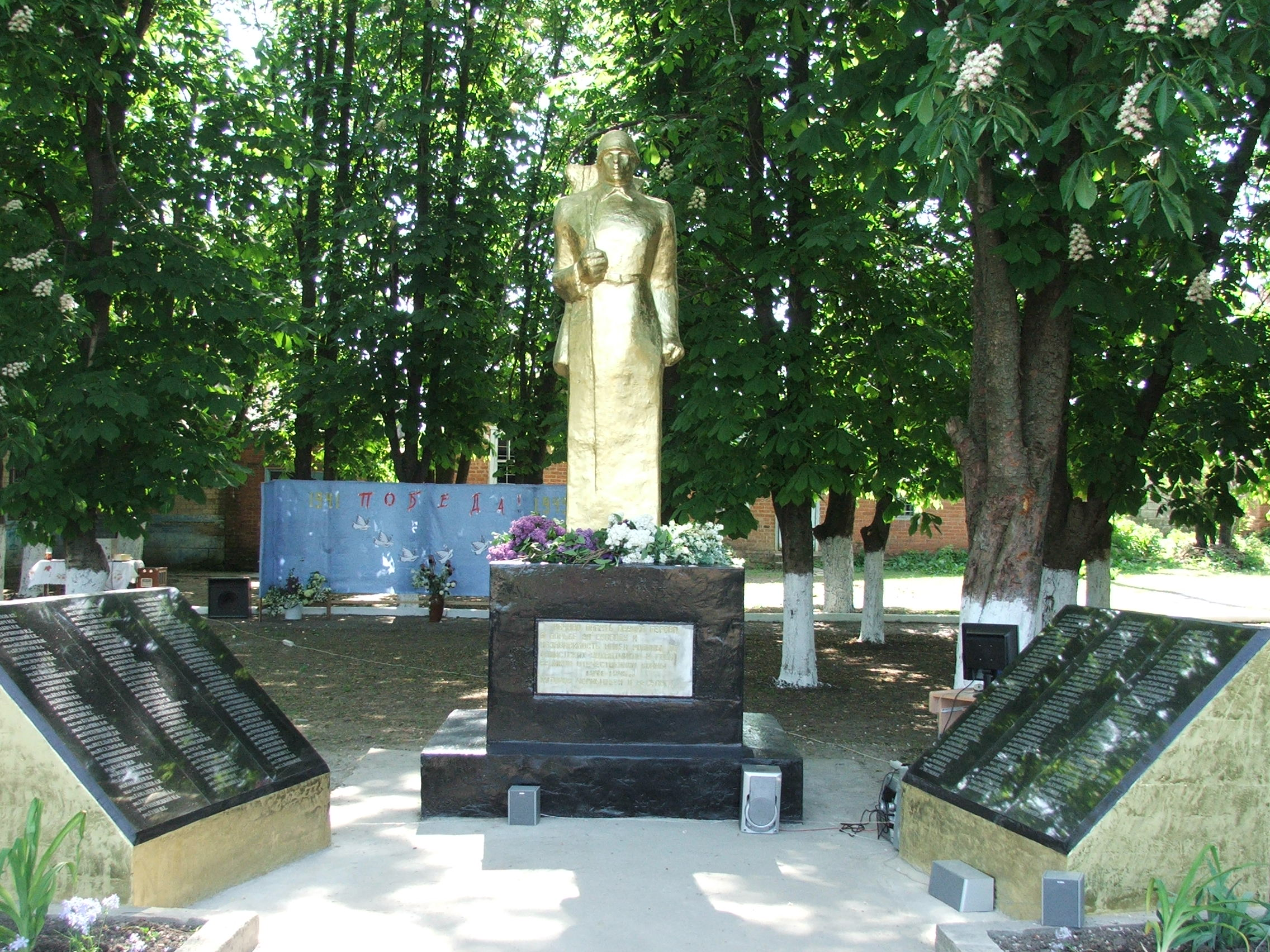 Мемориал воинам-землякам, погибшим в 1941-45 гг.